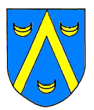 Blason de Guillaume de Cerisay, bailli du Cotentin, Vicomte de Carentan et maire d'Angers.